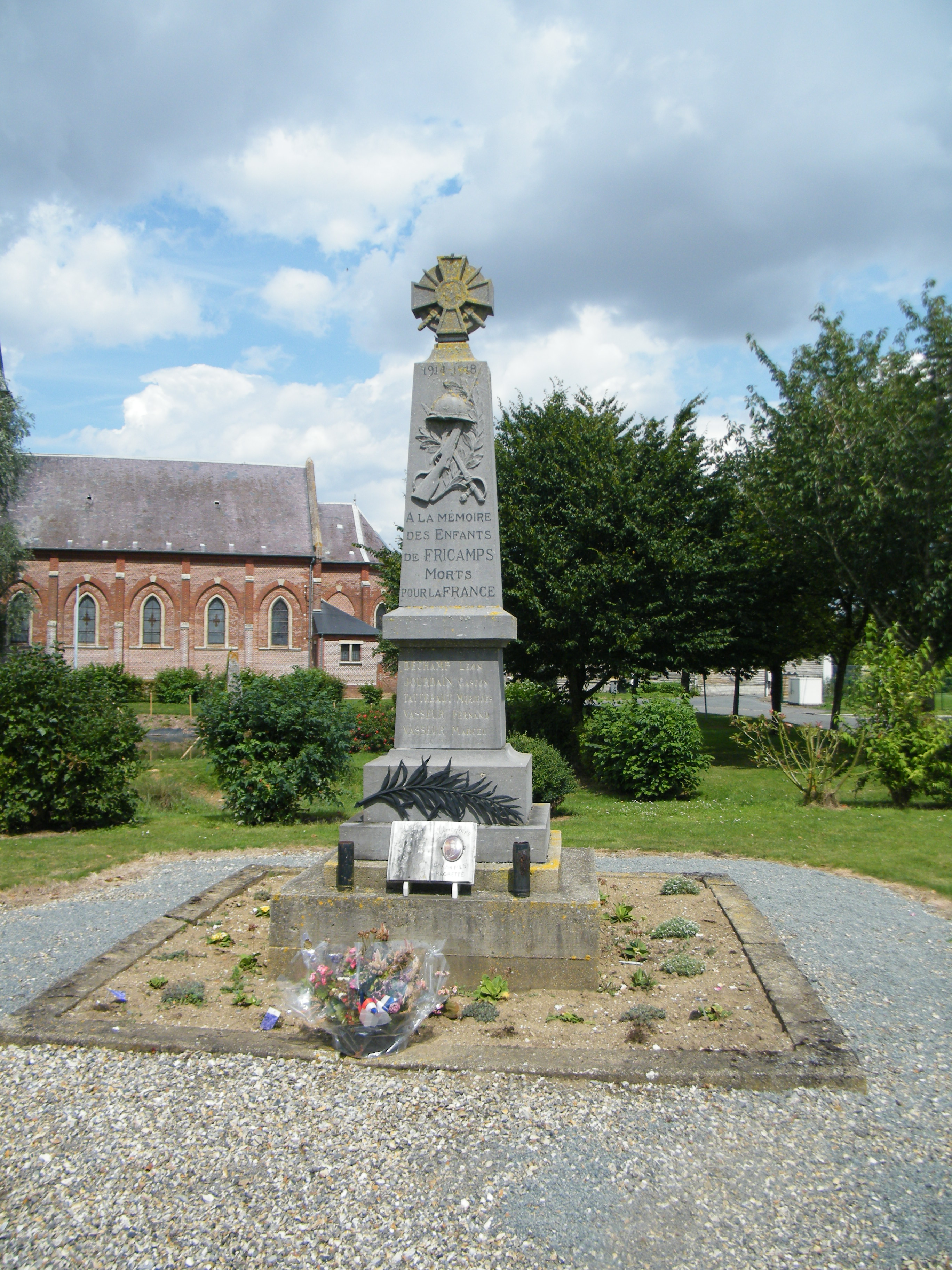 Monument aux morts pour la France.